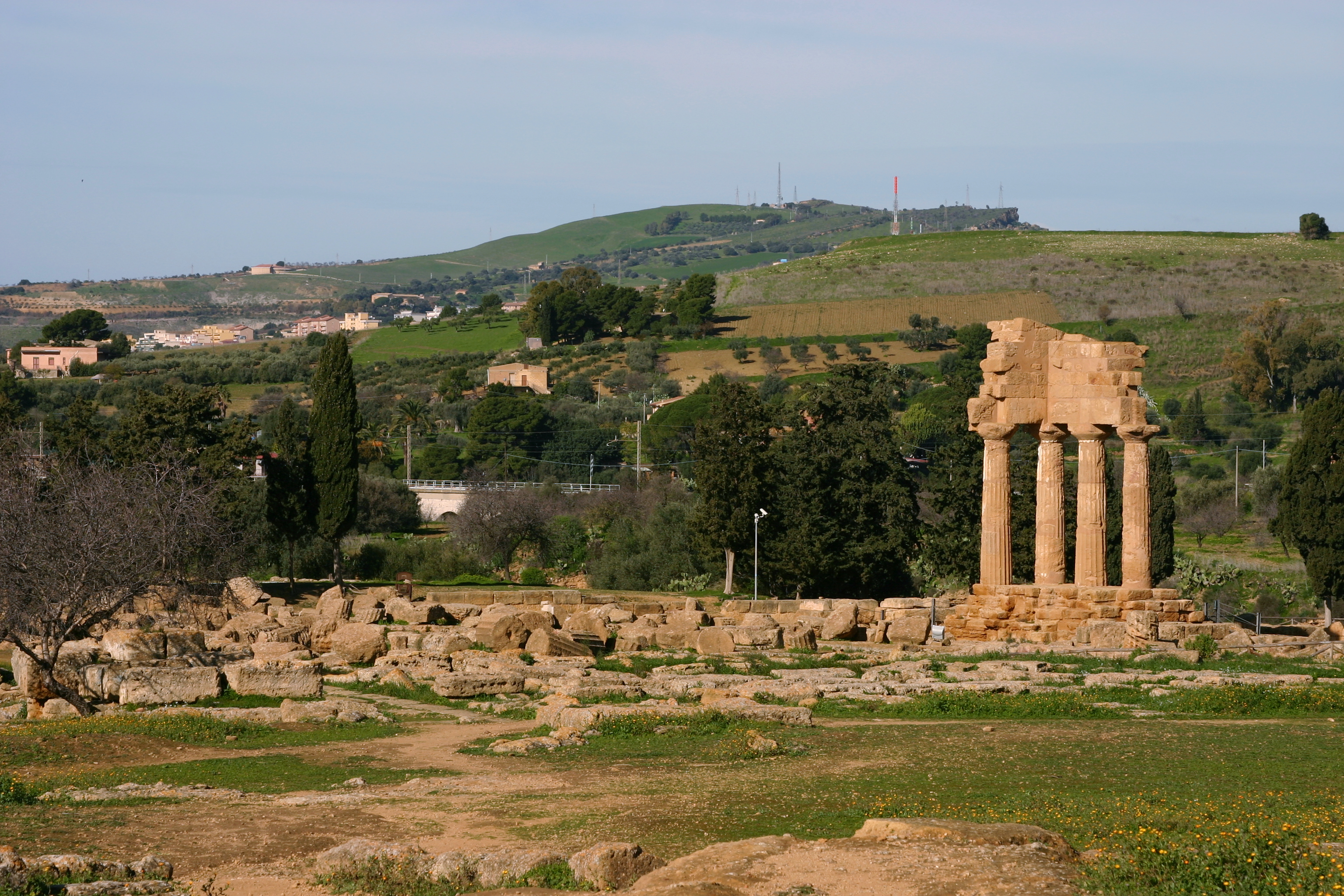 Valle dei Templi